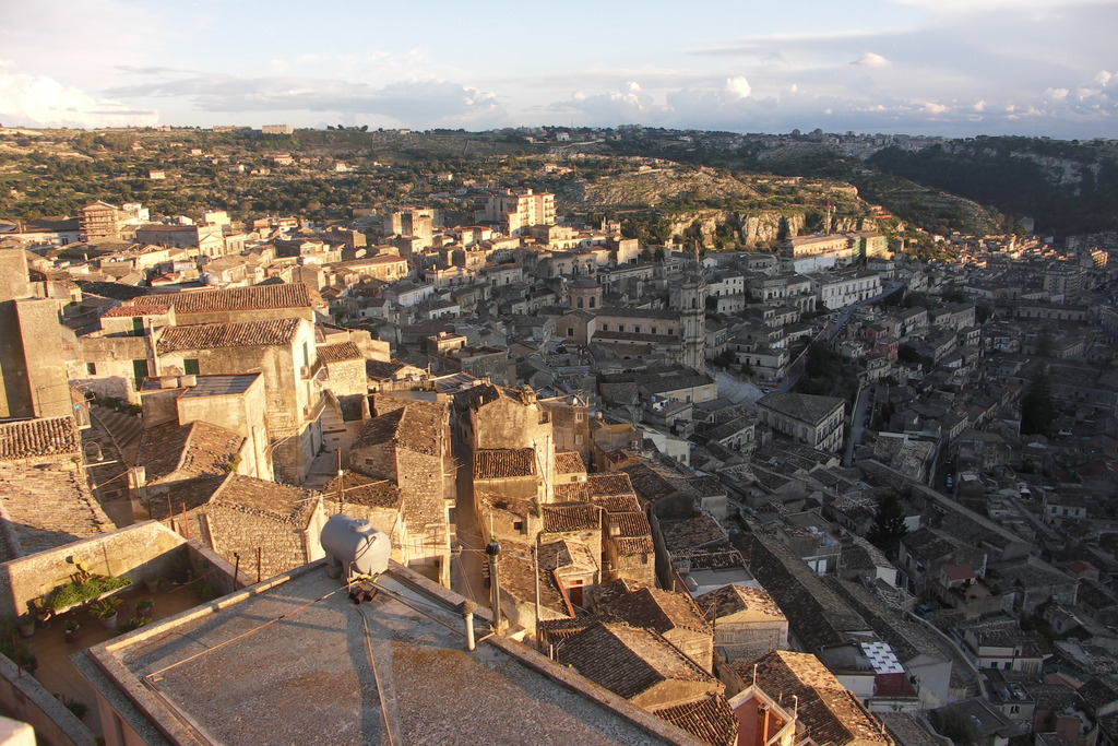 Modica, vue d'ensemble